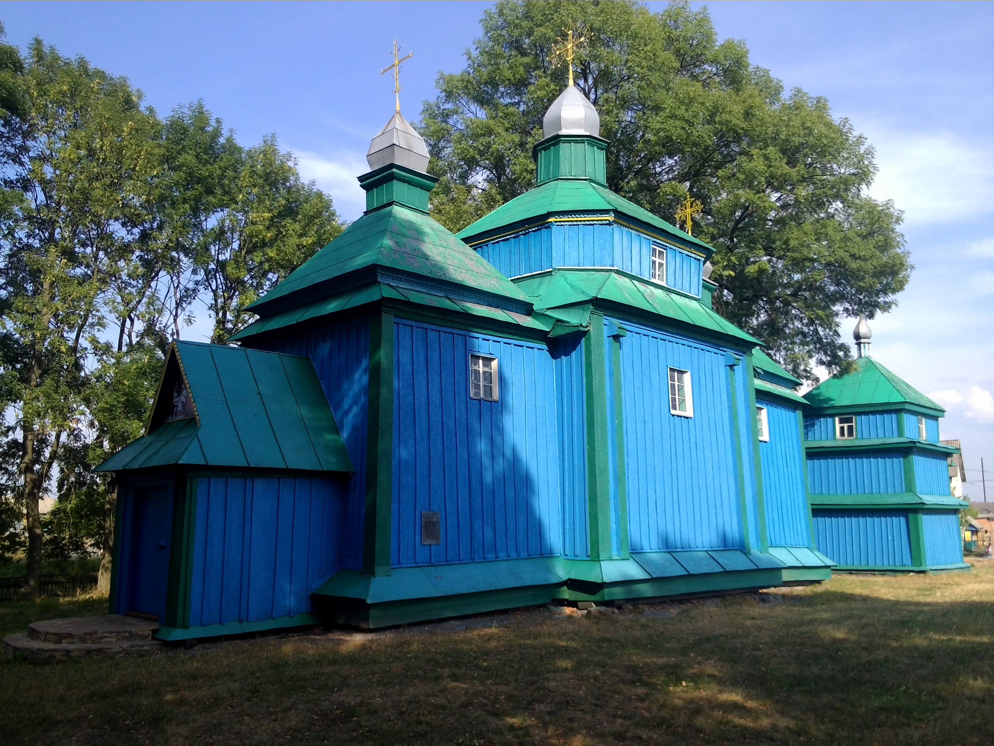 Церква Різдва Богородиці (дер.), с.Жубровичі